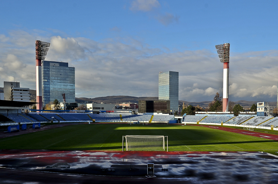 Futbalový štadión Pasienky